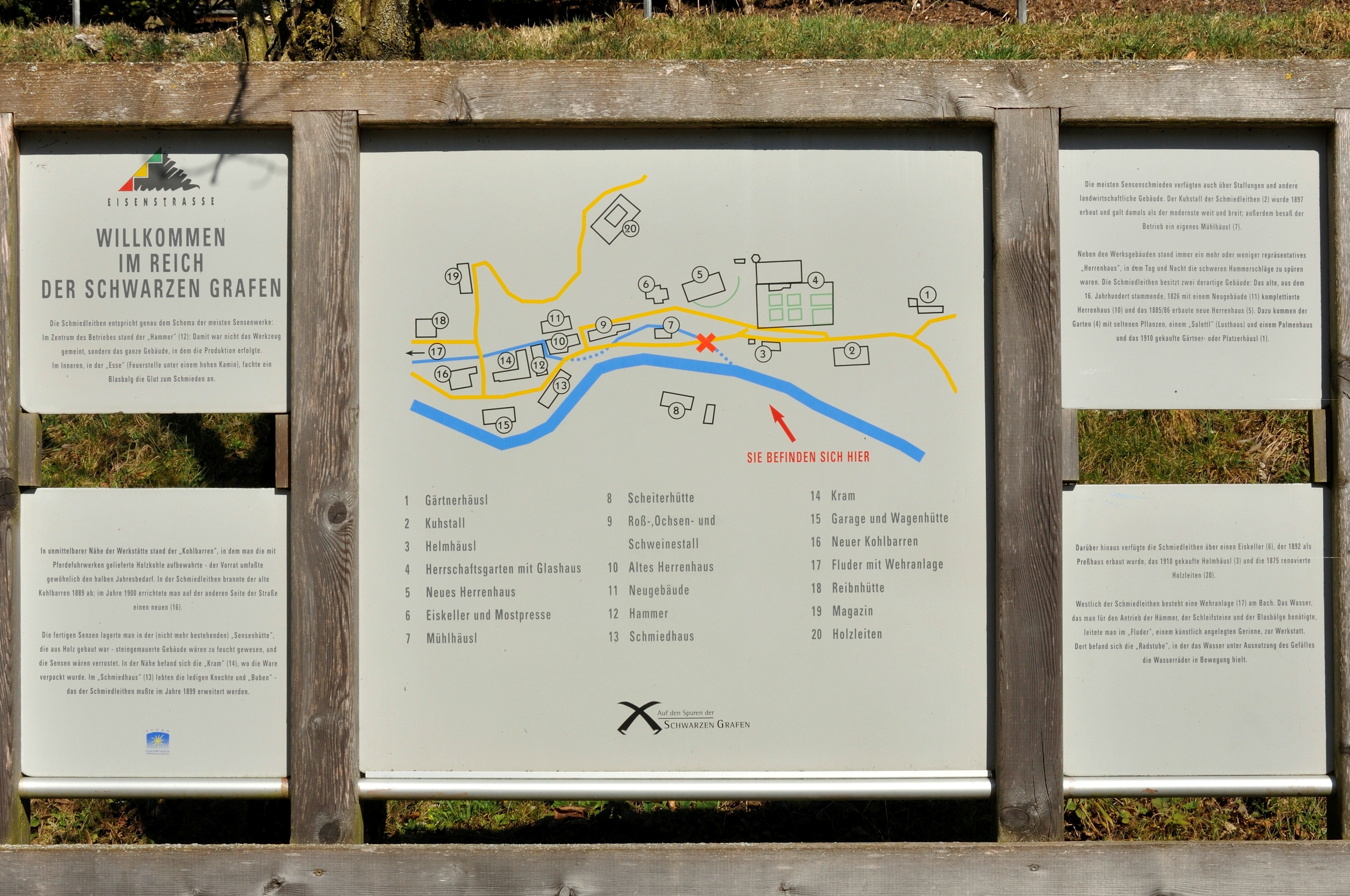 Holzschuppen zur Lagerung fertiger Sensen. Laut Orientierungstafel im Ensemble Schmiedleithen existiert dieser Schuppen nicht mehr.